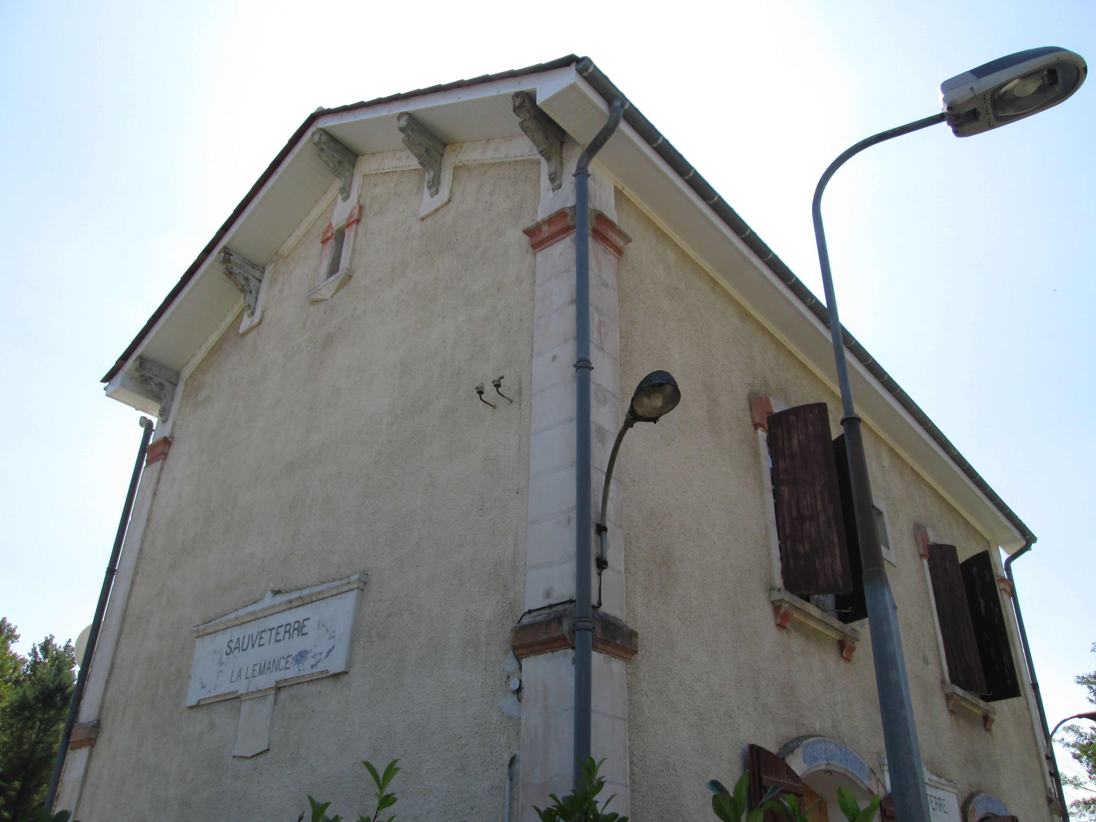 Ancien bâtiment voyageur de la Gare de Sauveterre-la-Lémance (Lot-et-Garonne)